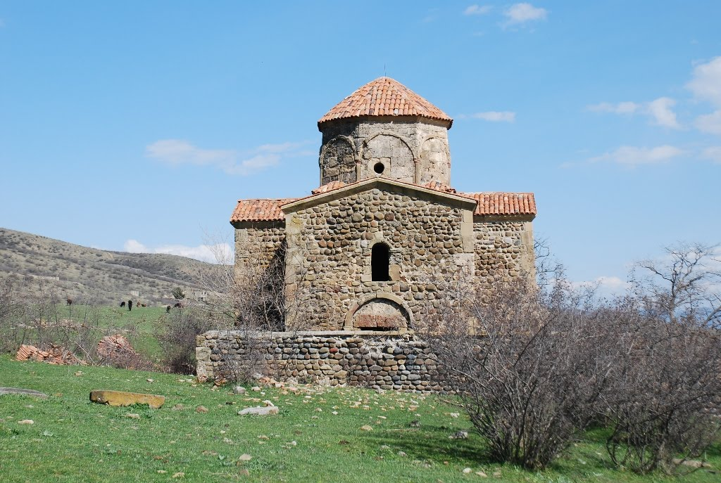 თელოვანის „ჯვარპატიოსანის“ ეკლესია